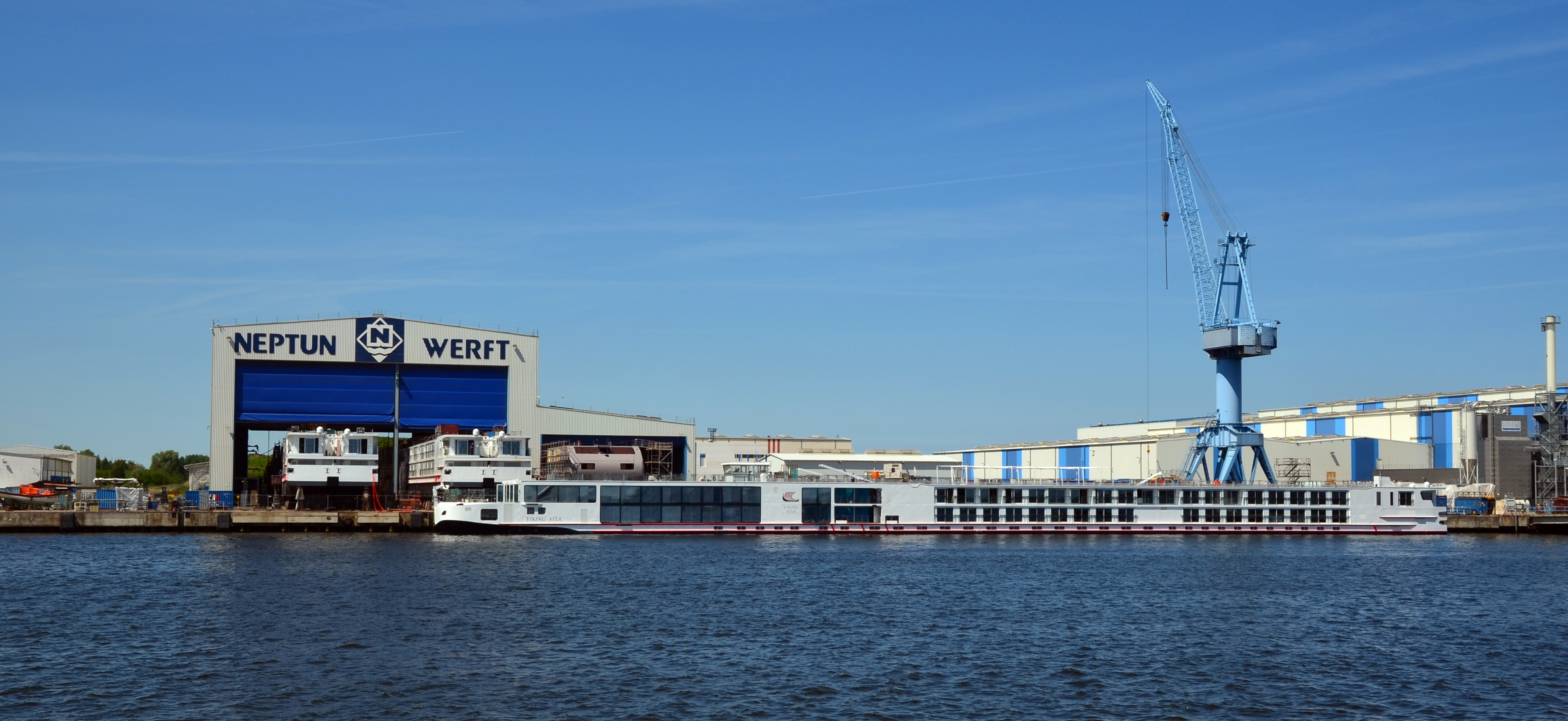 Hafen Rostock